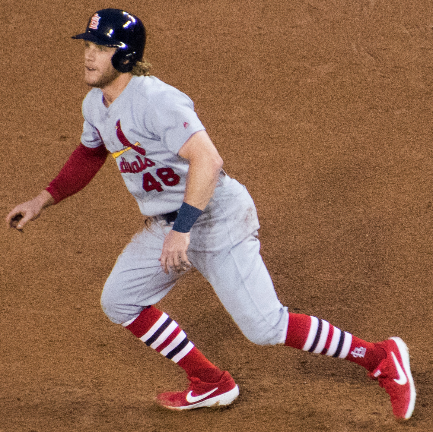 Harrison Bader